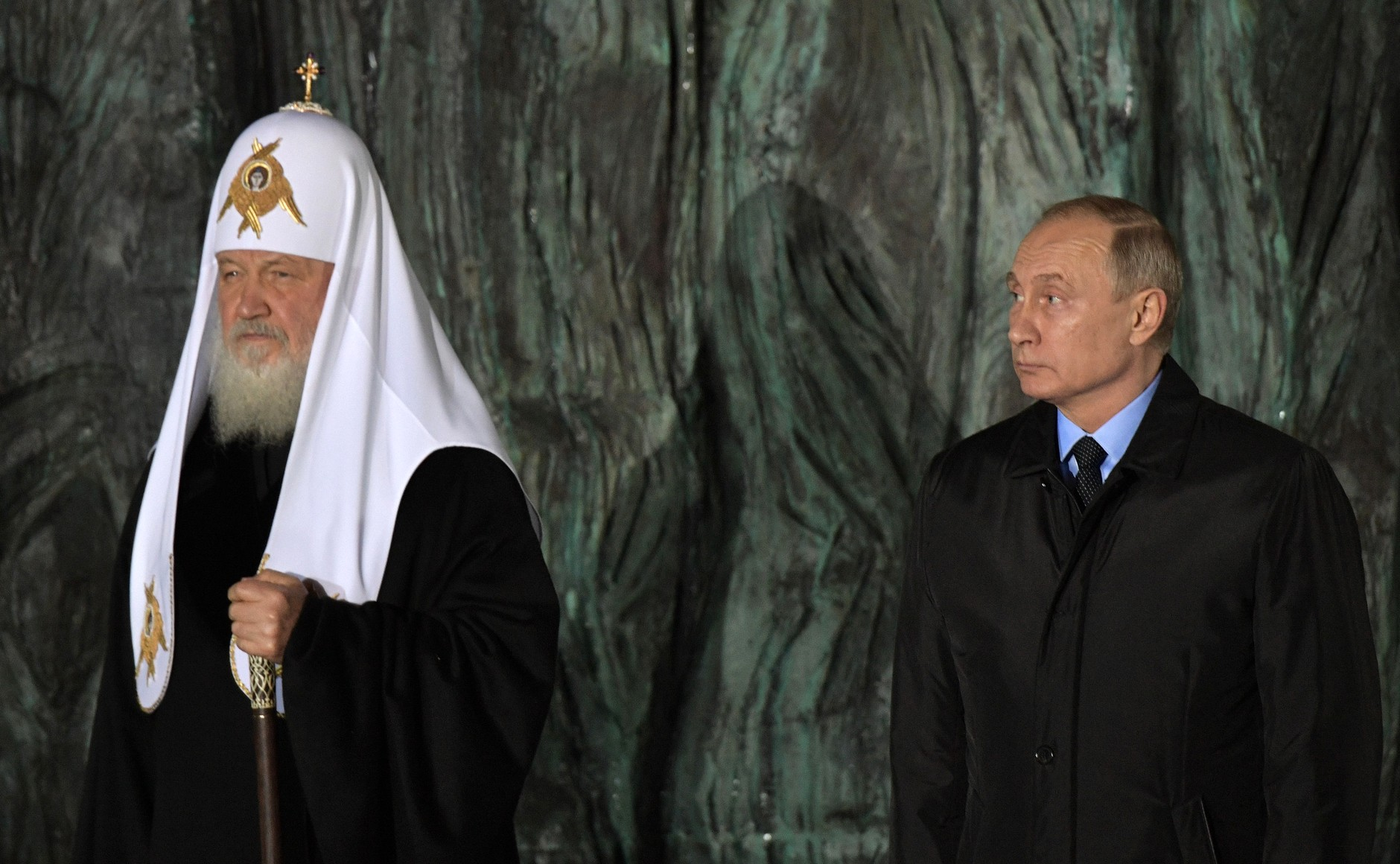 На церемонии открытия мемориала памяти жертв политических репрессий «Стена скорби». С Патриархом Московским и всея Руси Кириллом.